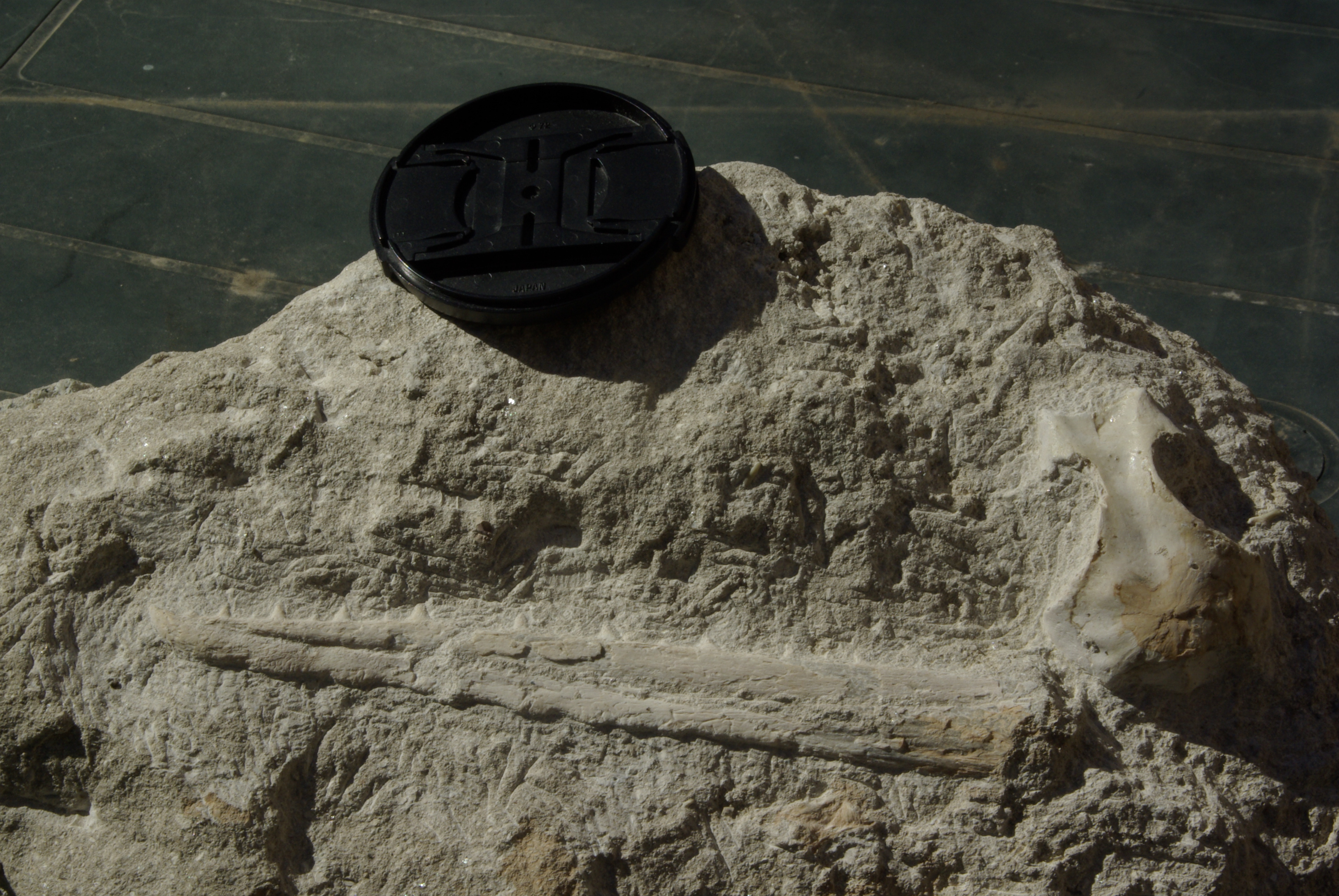 Odontopteryx topliaca fossile Paleocene\Eocene dei fosfati di Oued Zem, Khouribga, Marocco